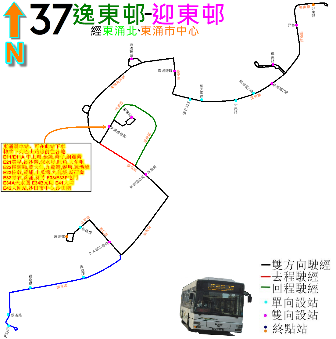 中文（香港）: 新大嶼山巴士37線的走線圖